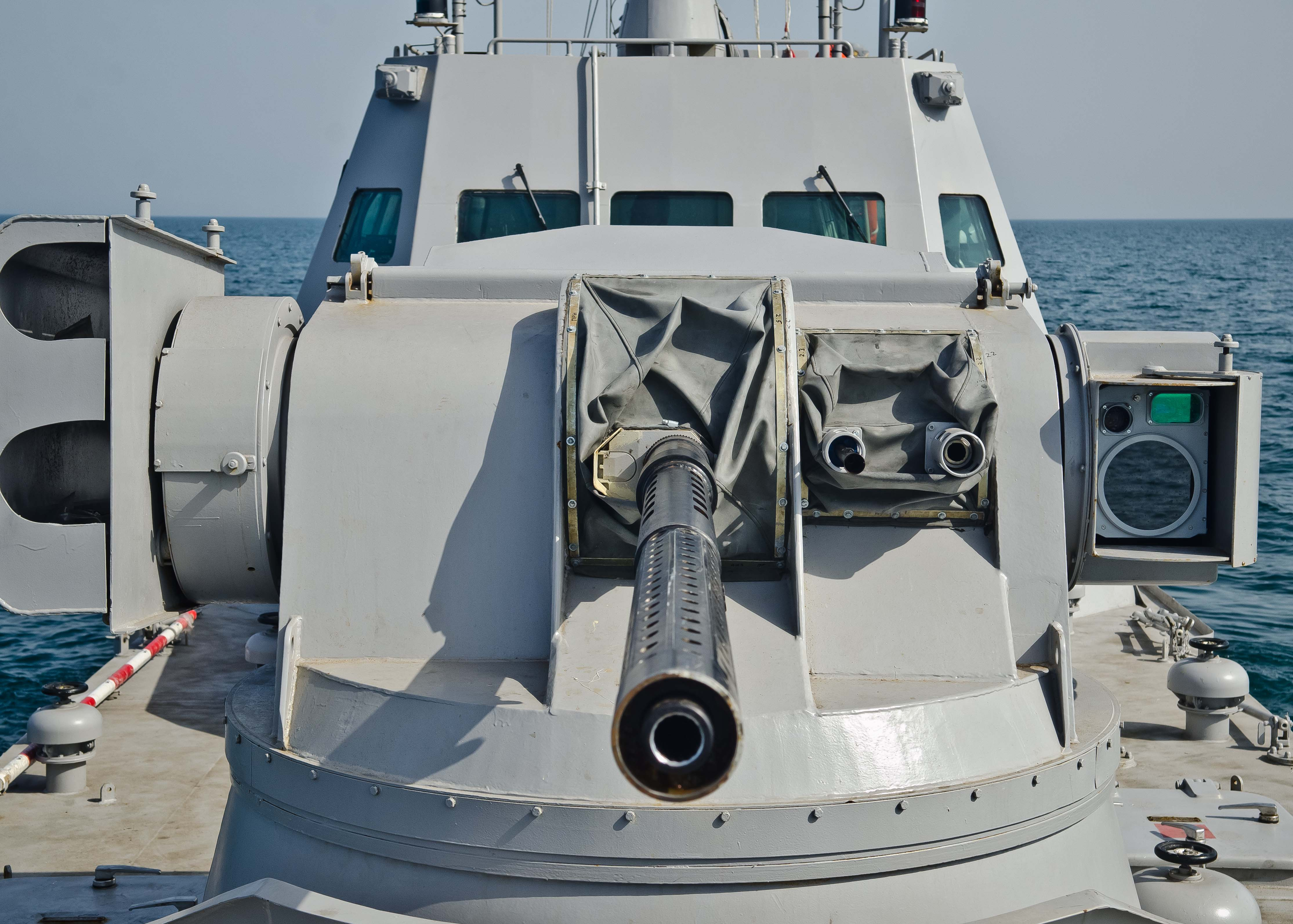 Майбутнє українського флоту - малі броньовані артилерійські катери "Бердянськ" (U-174) та "Аккерман" (U-175) під час ходових випробувань у відритому морі. Два новозбудовані для Військово-Морських Сил Збройних Сил України малі броньовані артилерійські катери в ході випробувань у відкритому морі здійснили спільне плавання. Під час виходу у складі тактичної групи катерів перевірено роботу систем і механізмів у штормових умовах. Матеріальна частина працювала в штатному режимі. Державні іспити та ходові випробування в морі тривають. Фото: Євген Силкін